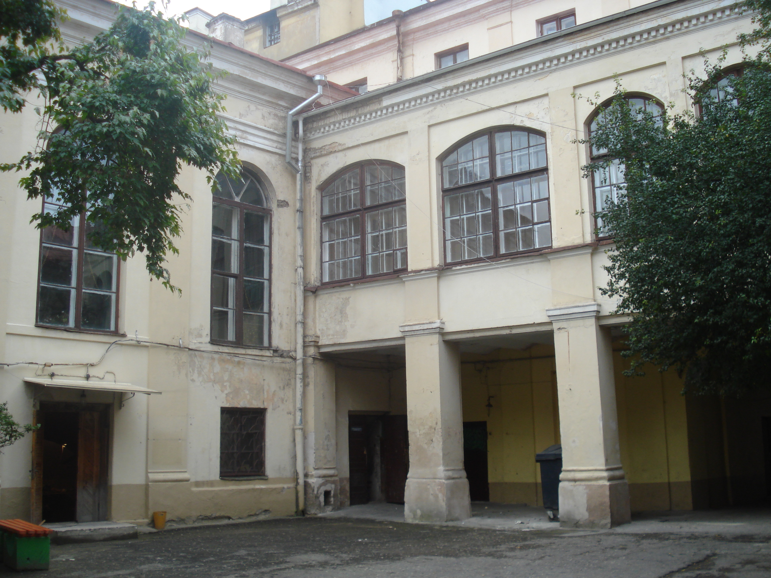 Abramowicz Palace in Vilnius (Vilnius J. Tallat-Kelpša Conservatoire; Didžioji g. 36). Yard